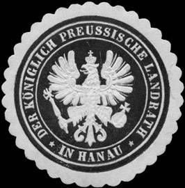 Sealing stamp Title: Der Königlich Preussische Landrath in Hanau Description: schwarz, weiß, geprägt Place: Hanau size: 4 cm